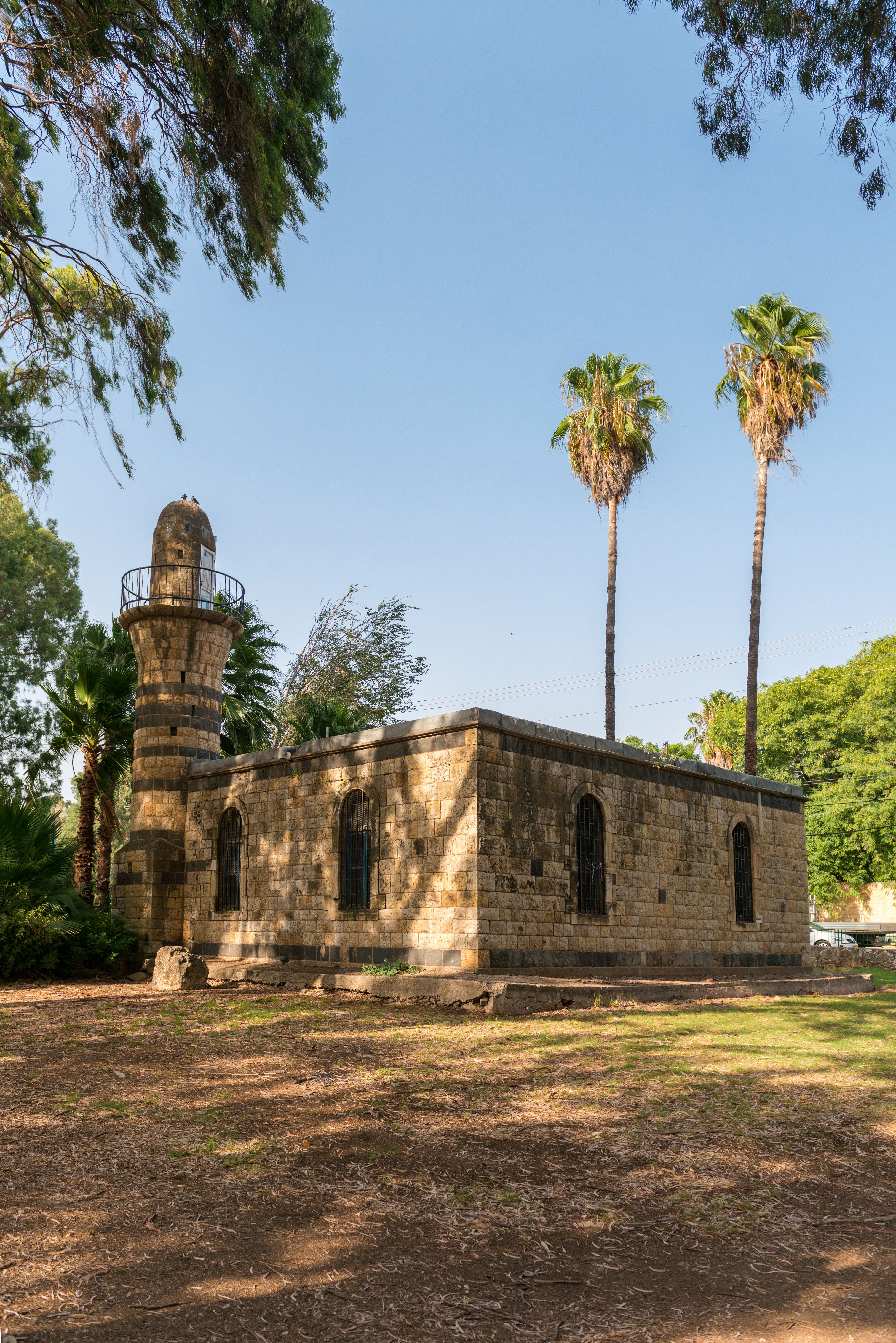 מסגד קריית שמונה